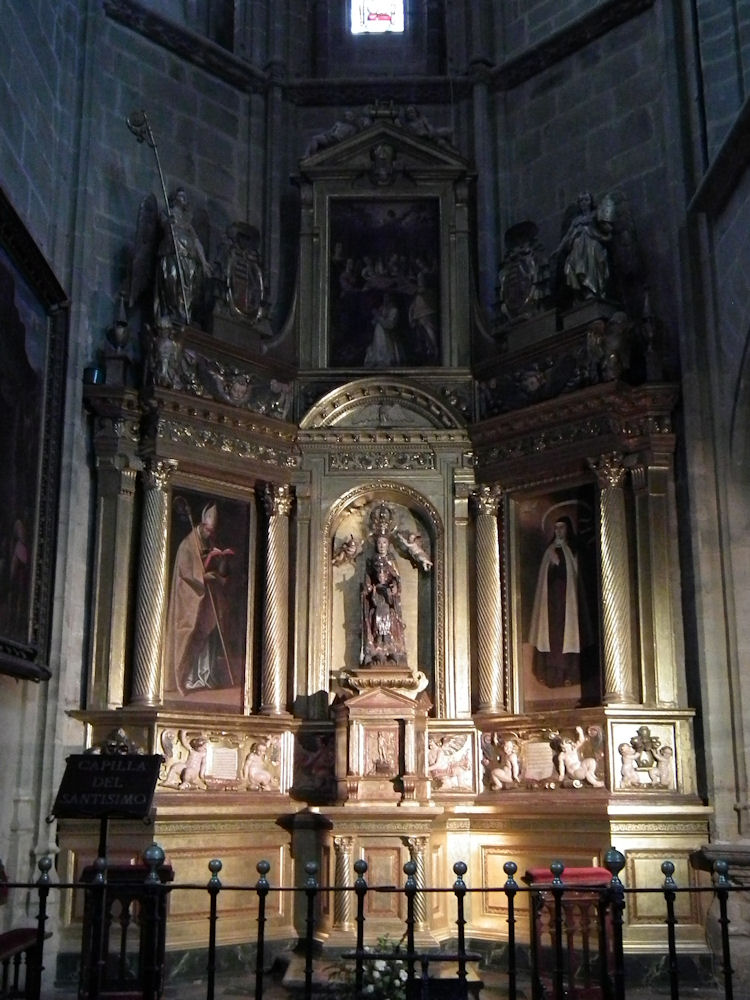 Capilla del Santisímo, Catedral de Santa María, Astorga, León, Spain